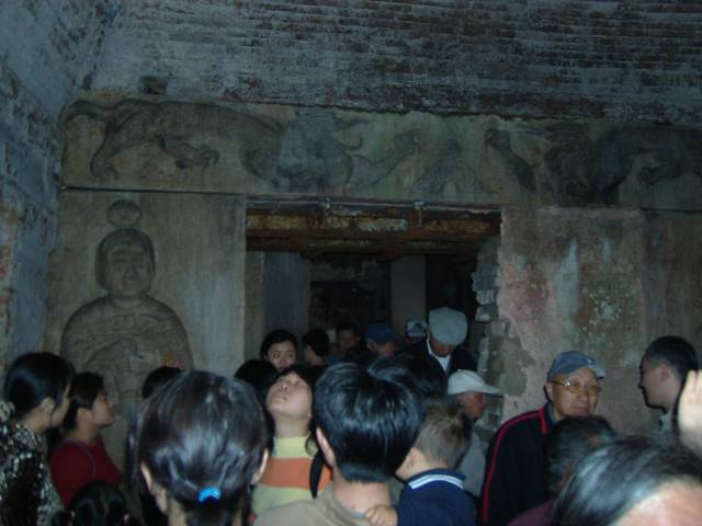 南唐二陵 欽陵内部 2004年4月24日撮影 撮影者：権作 参照：